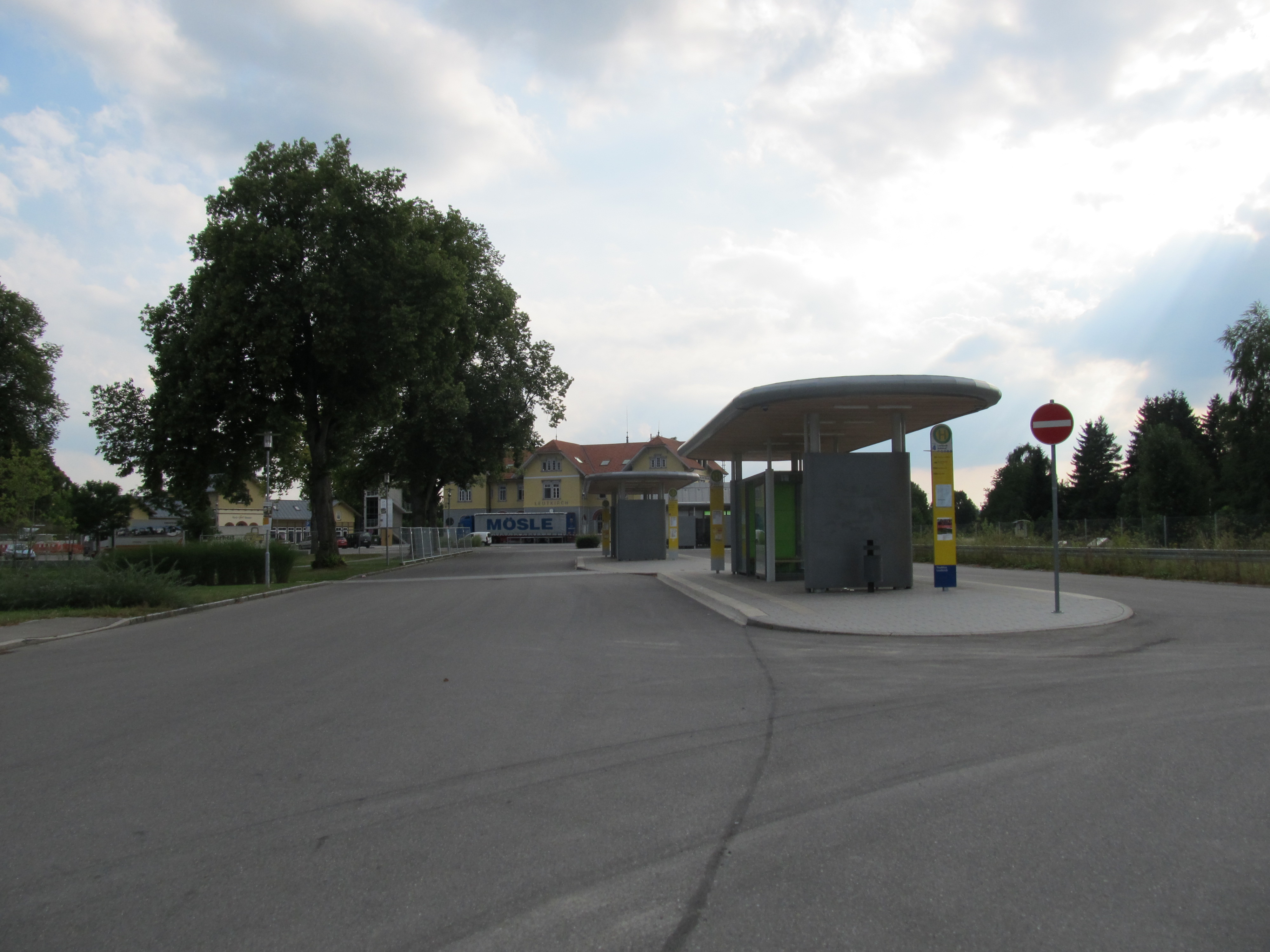 Busbahnhof des Leutkirchner Bahnhofes